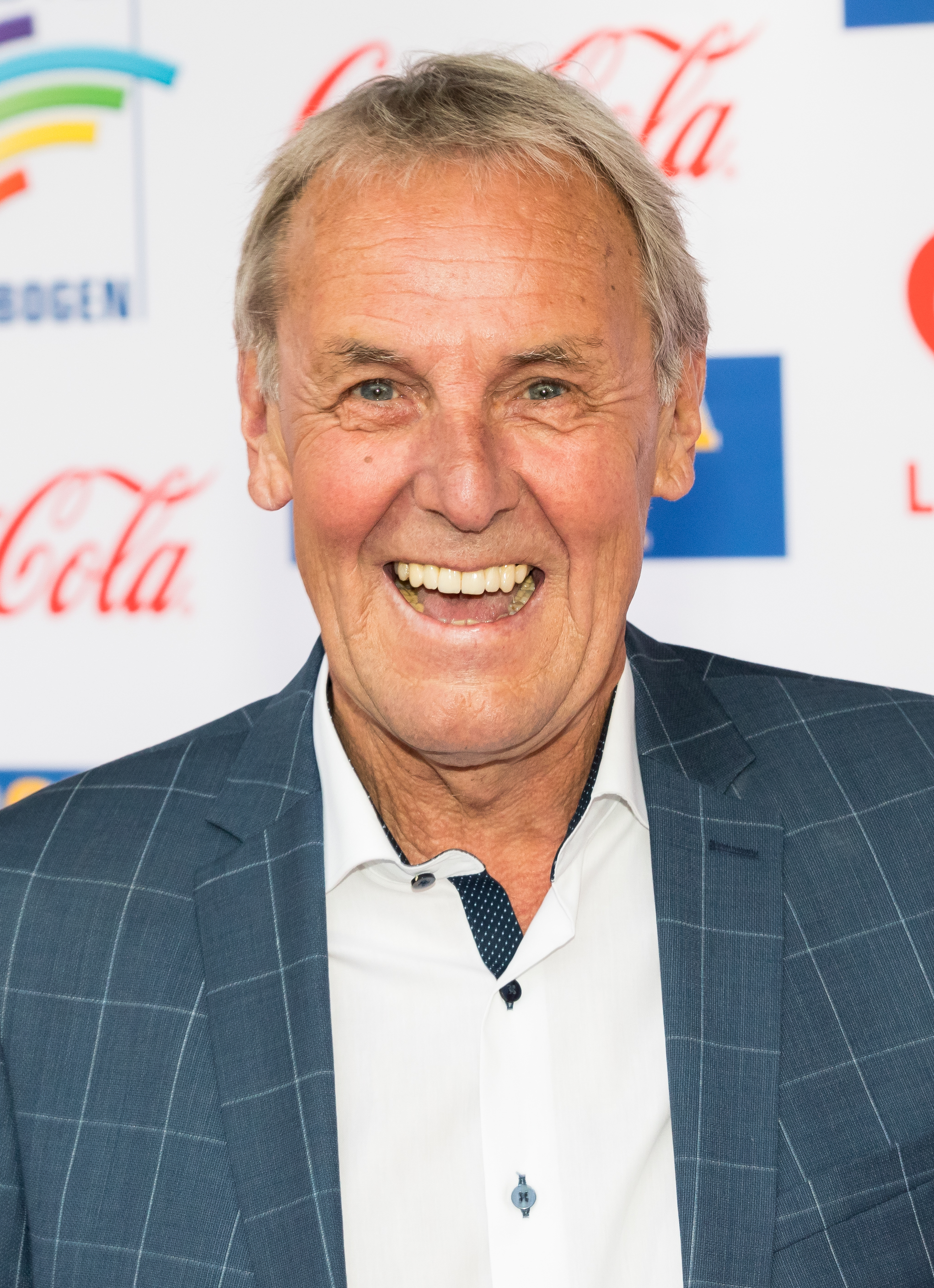 Jörg Wontorra during Radio Regenbogen Award 2019 at Europapark, Rust, Baden-Württemberg, Germany on 2019-04-12, Photo: Sven Mandel